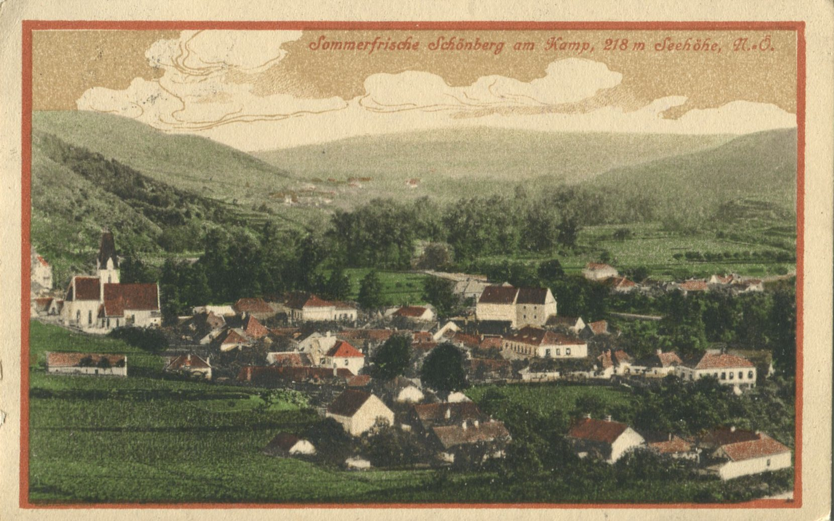 Sommerfrische Schönberg am Kamp. Historische Ansichtskarte um 1900.